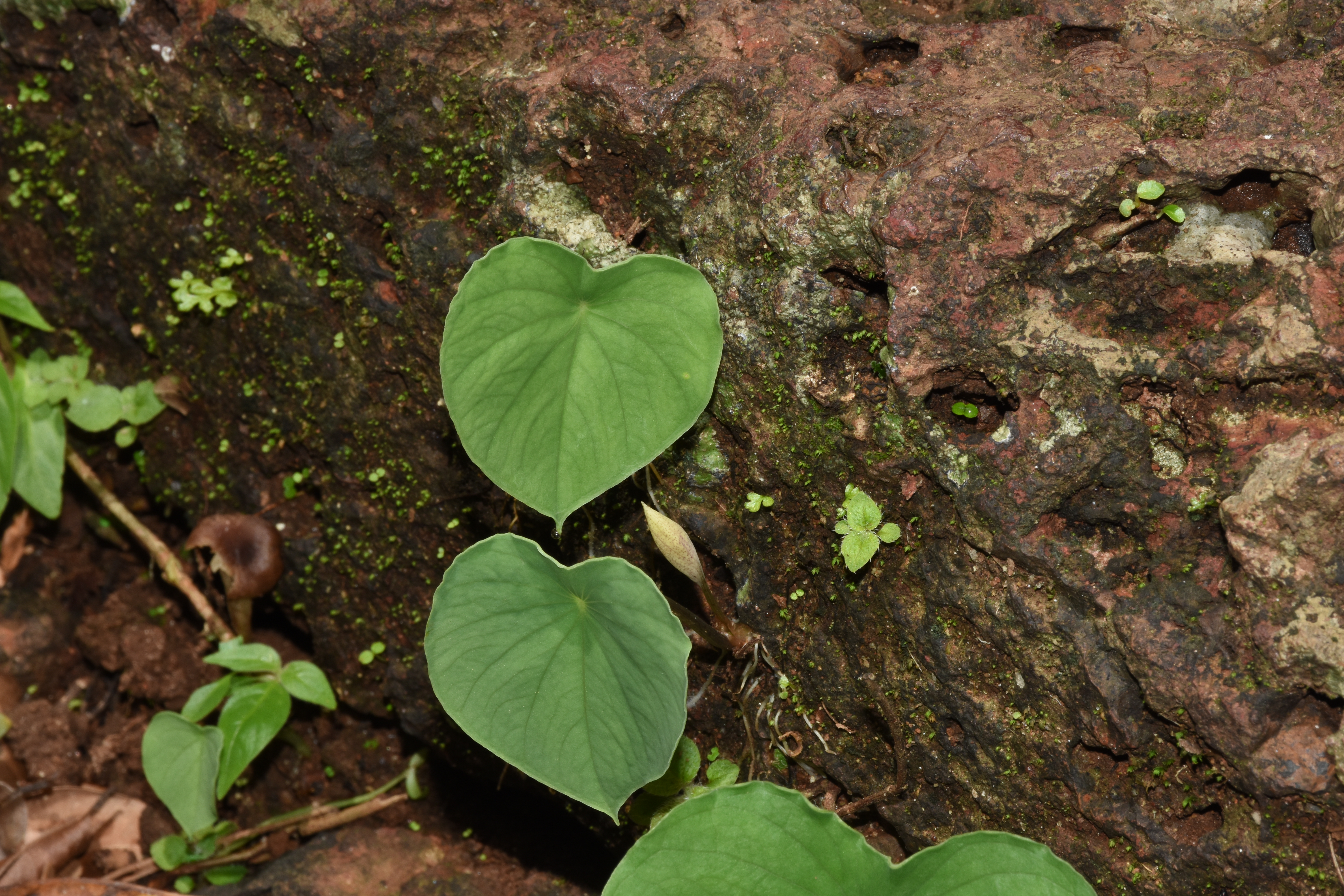 ചെങ്കല്ലിൽ പറ്റിപ്പിടിച്ച് വളരുന്ന ചേമ്പ് കുടുംബത്തിൽ പെട്ട ചെറുസസ്യം. അരിയോപ്സിസ് ജീനസിൽ ആകെ ഉള്ള രണ്ട് സ്പീഷീസുകളിൽ ഒന്ന്.